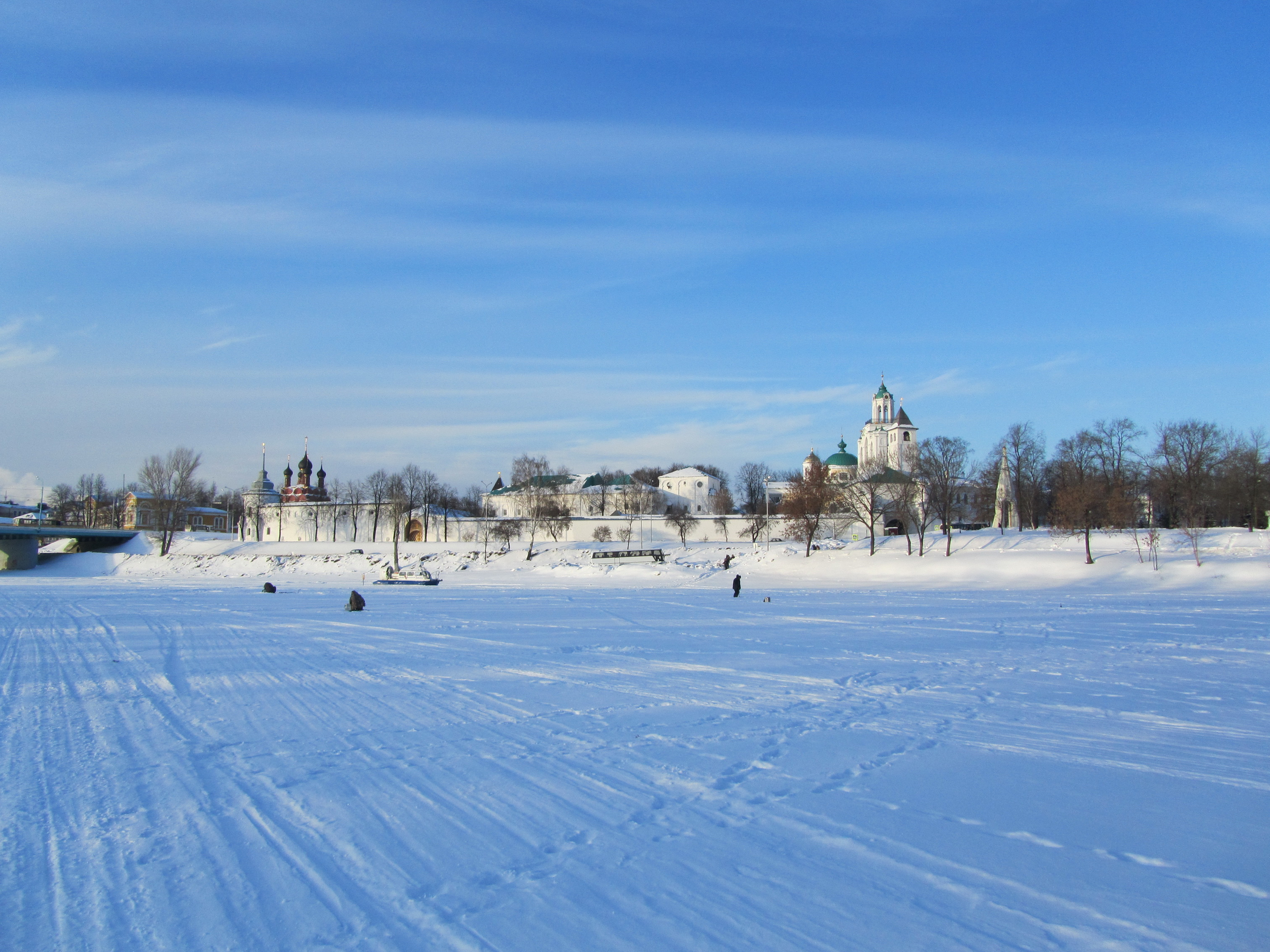 Ярославль, Спасо-Преображенский монастырь на реке Которосль